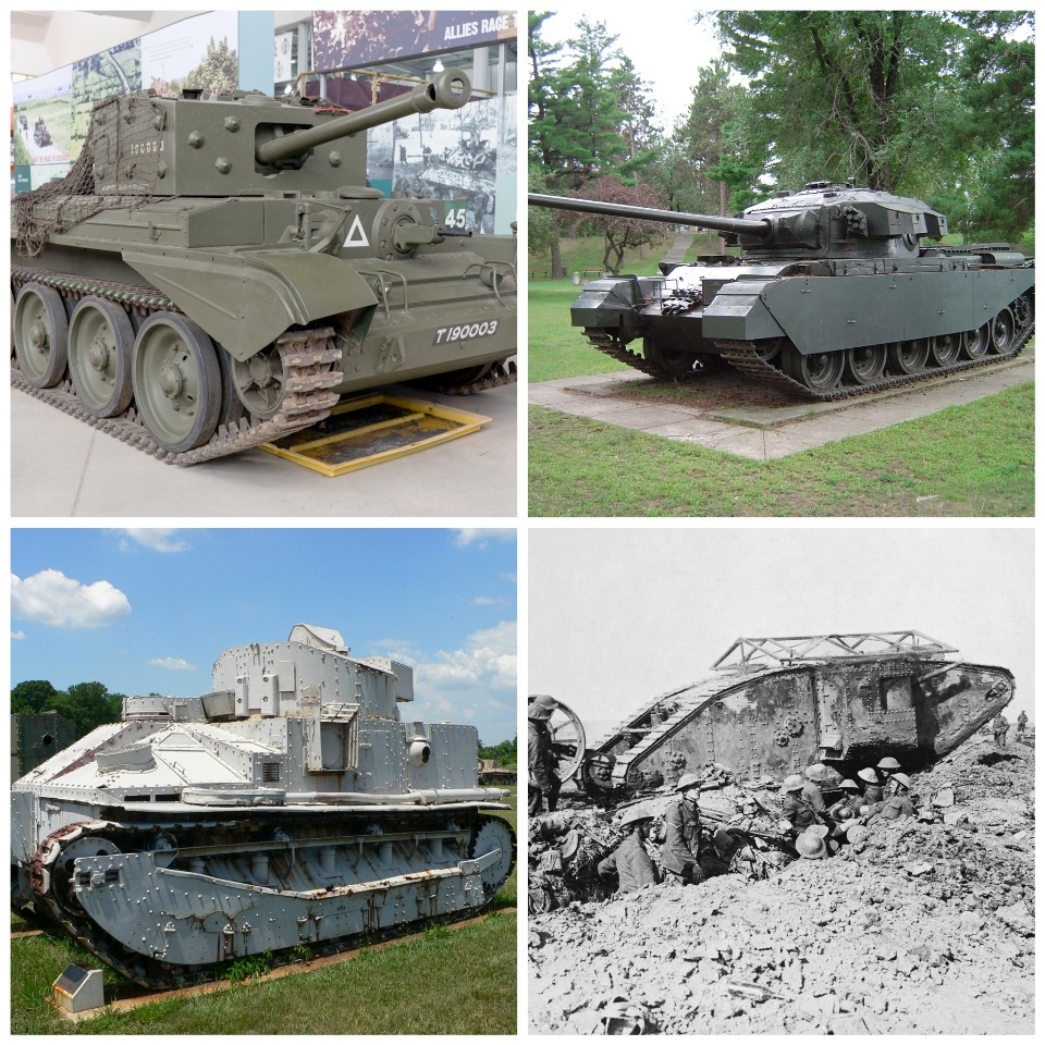 위키백과의 영어판 원본인 File:Cromwell (A27M) front-right 2017 Bovington.jpg, File:Centurion cfb borden 1.JPG, File:Vickers Medium Mk IIA 1.jpg,File:British Mark I male tank Somme 25 September 1916.jpg를 편집하여 만들었습니다.